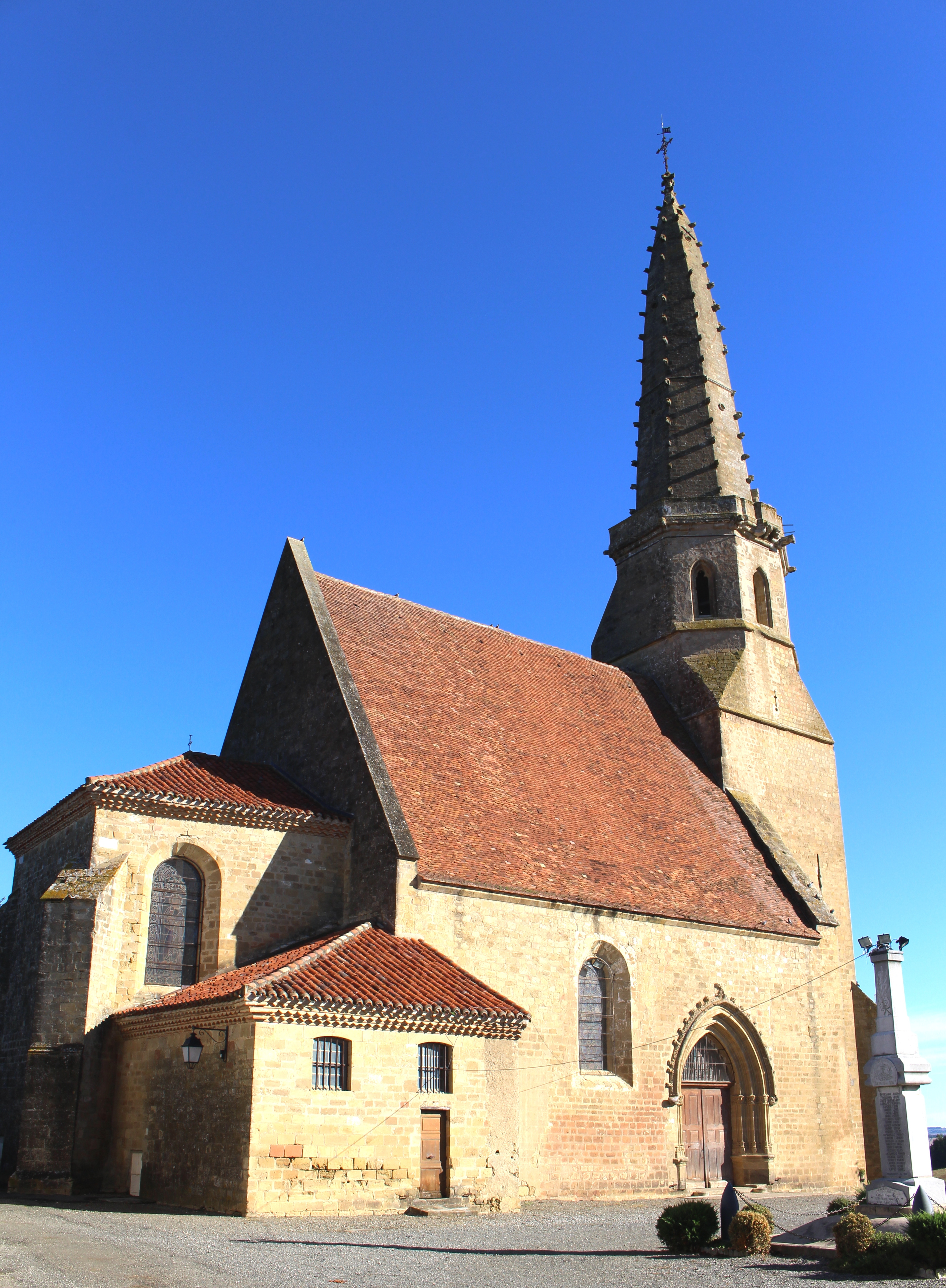 Église de la Nativité-de-la-Sainte-Vierge d'Auriébat (Hautes-Pyrénées)